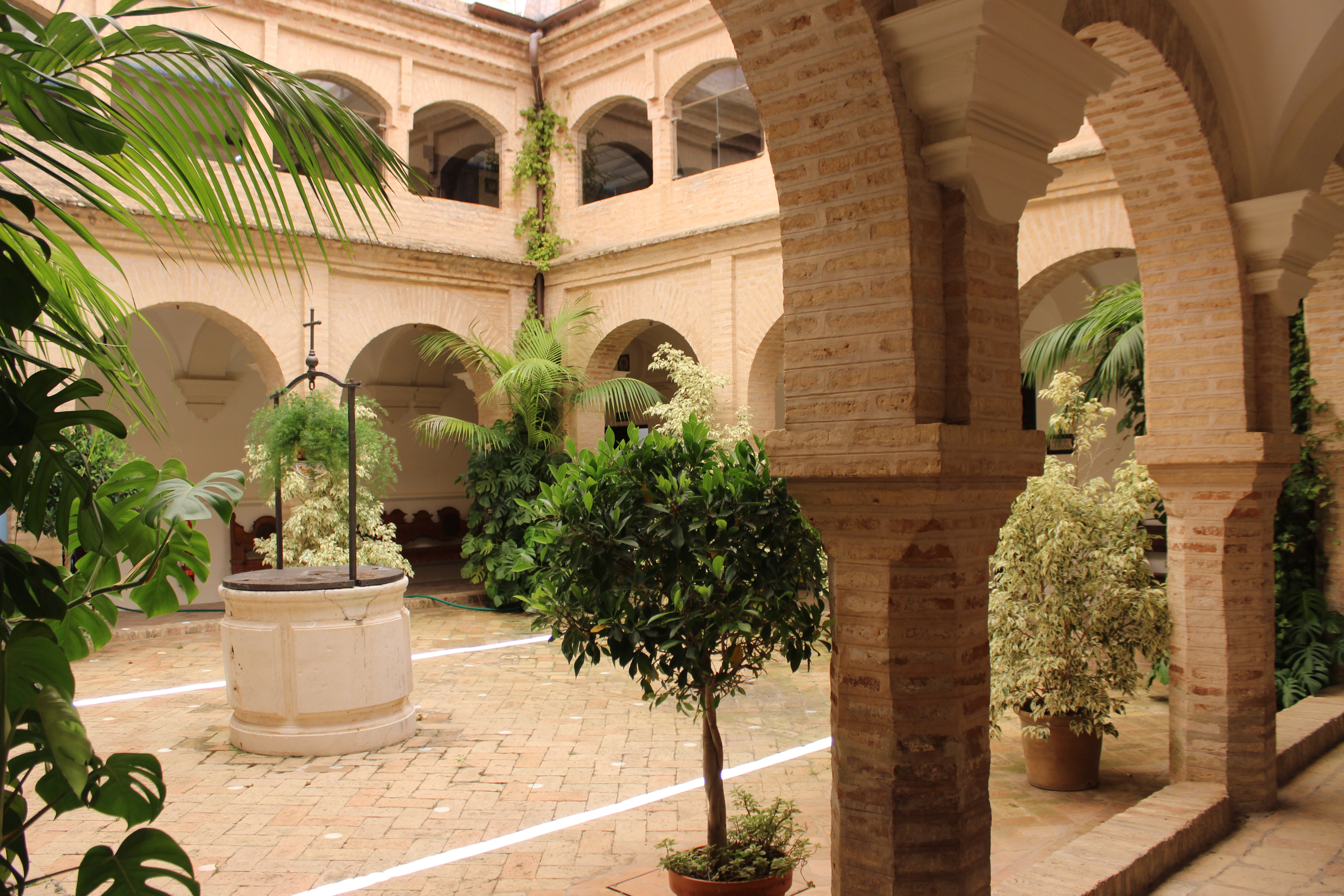 Espartinas. Convento de Nuestra Señora de Loreto. Claustro.